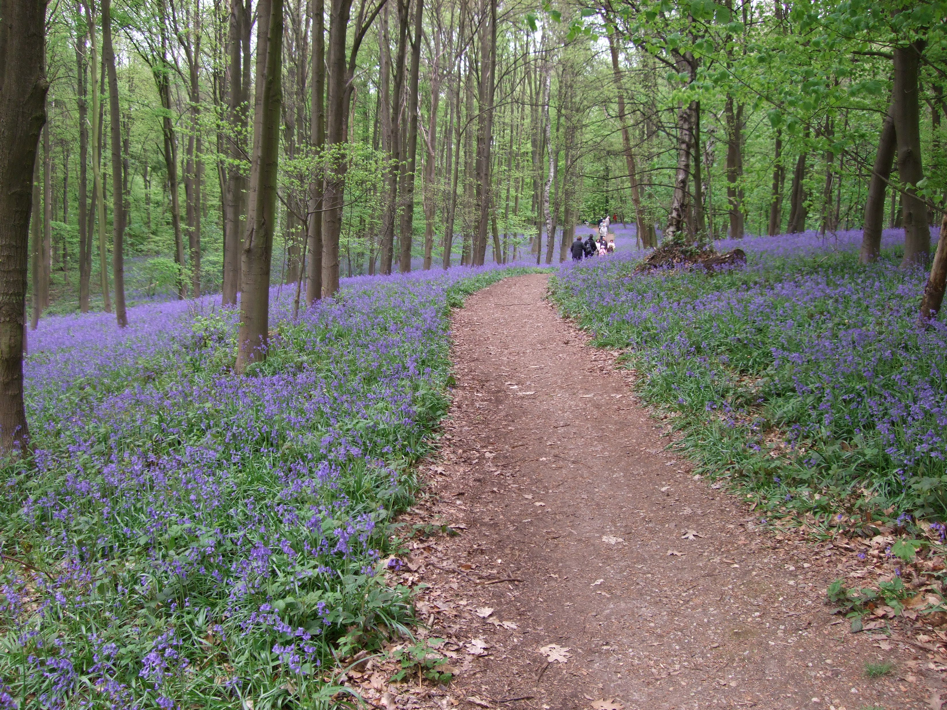 The Bluebells Wood half-way between Doveren and Baal in Germany. / Der sogenannte "Wald der blauen Blumen" zwischen Doveren und Baal in Deutschland.